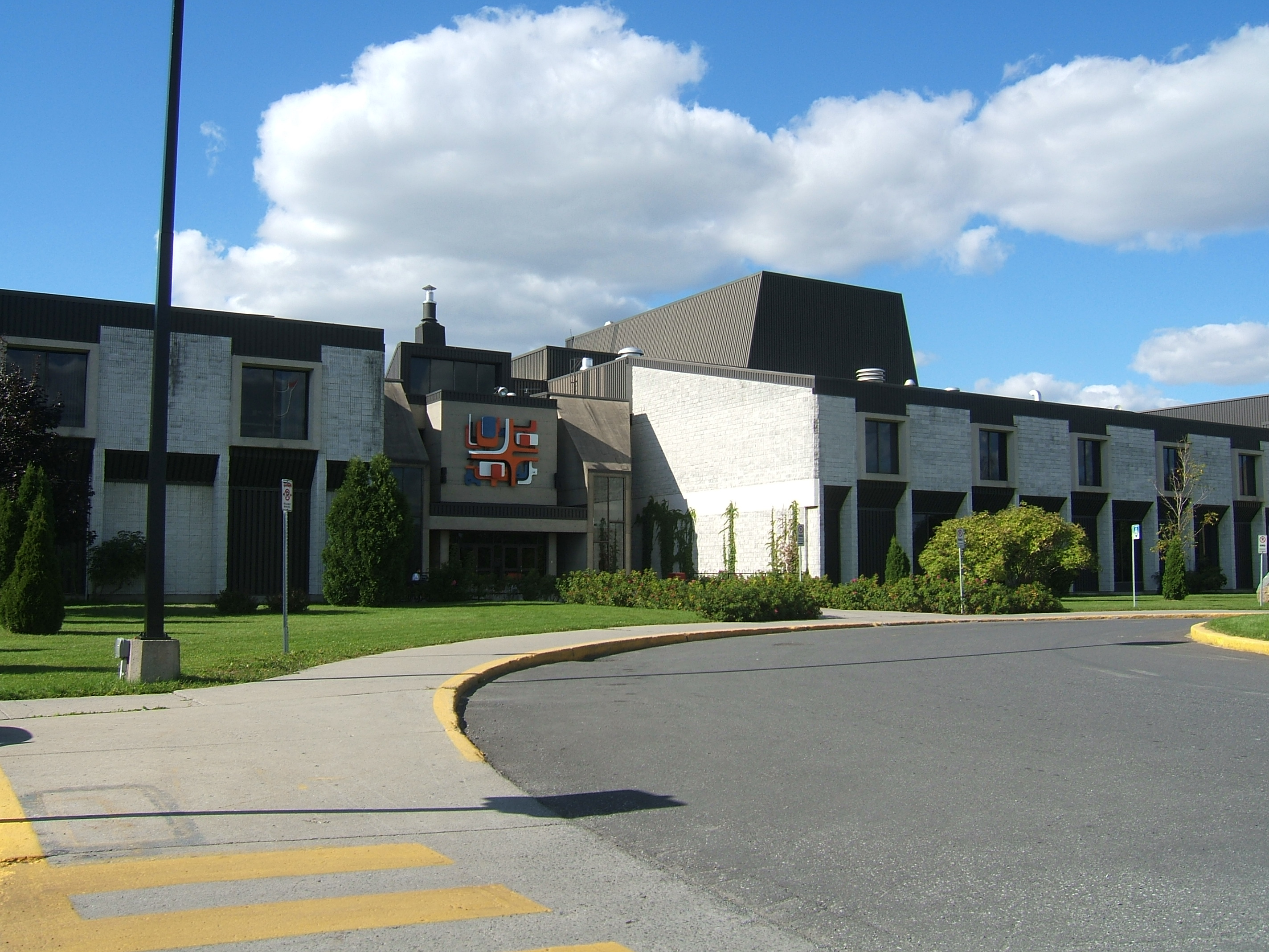 Cégep de Saint-Hyacinthe en 2006